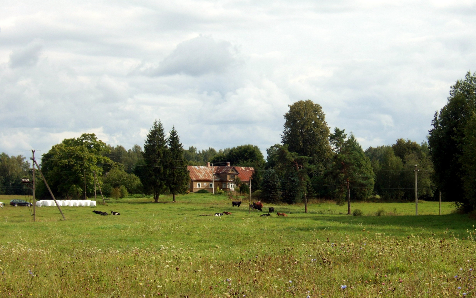 Madagaskaro viensėdis